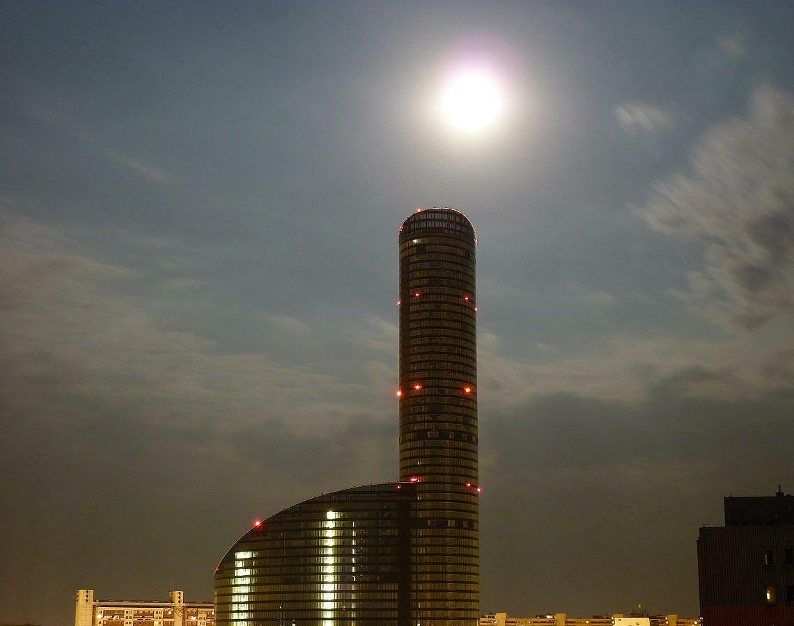 Pełnia nad Sky Tower